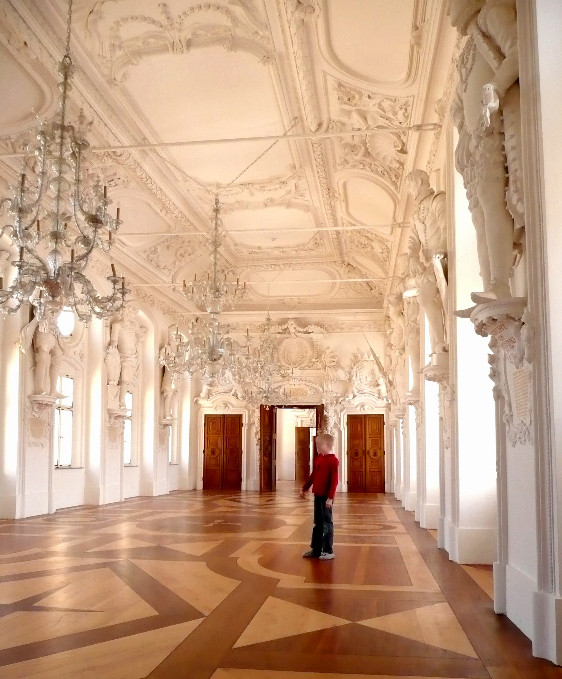 Festsaal im Südflügel der Ringburganlage mit leicht überlebensgroßen Ahnenstatuen.